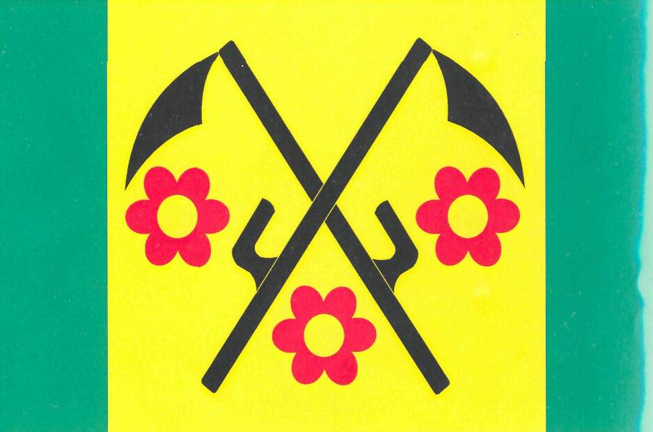 Vlajka obce Sentice